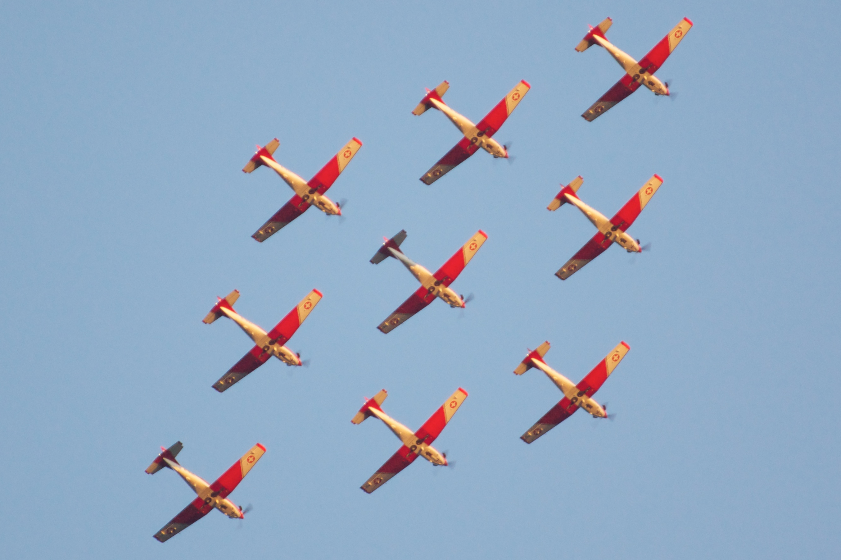 La Pc-7 team en formation diamant au dessus du lac de Morat le 2 juillet 2011 à l'occasion du festival walk and jam